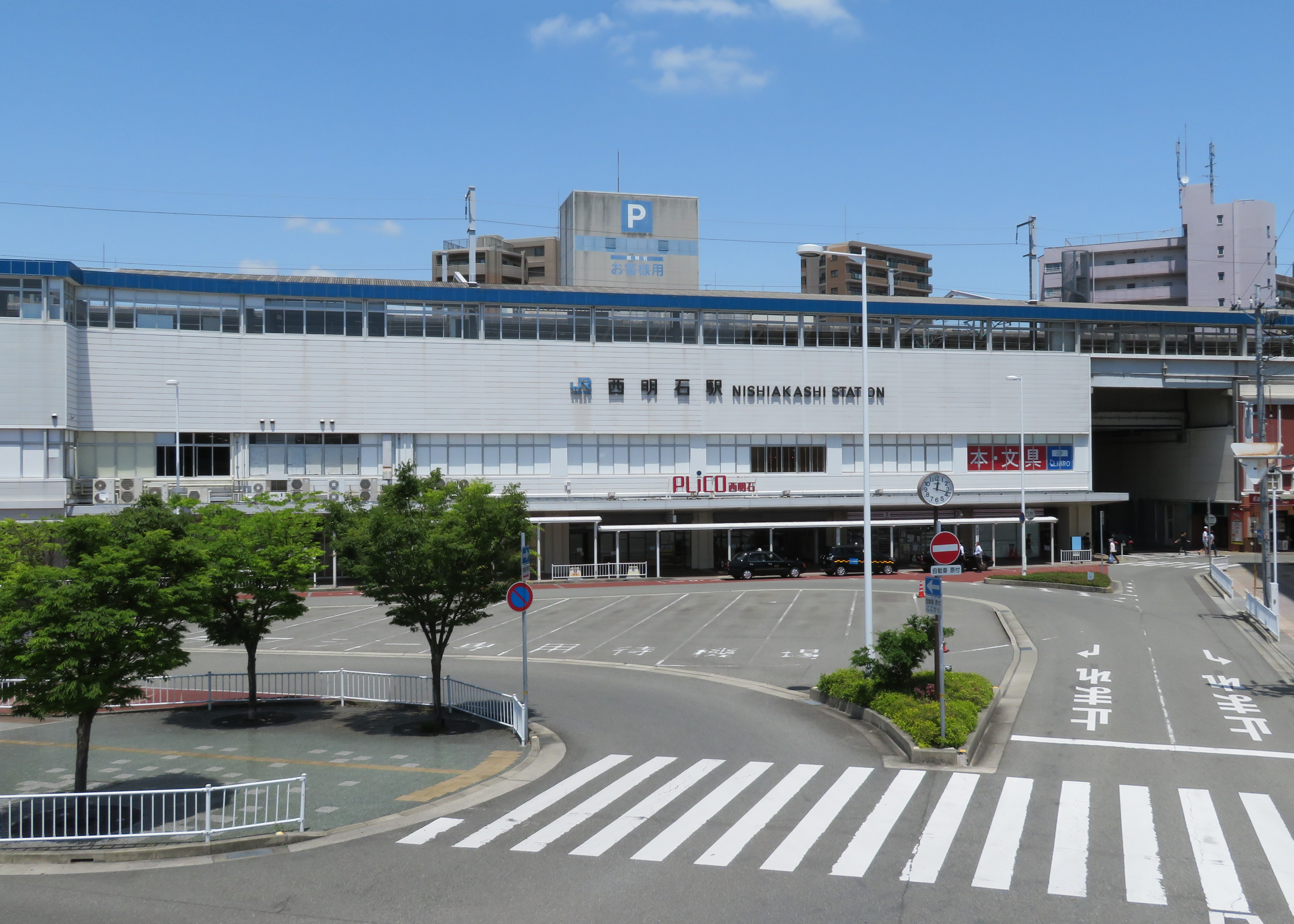 JR西明石駅西口